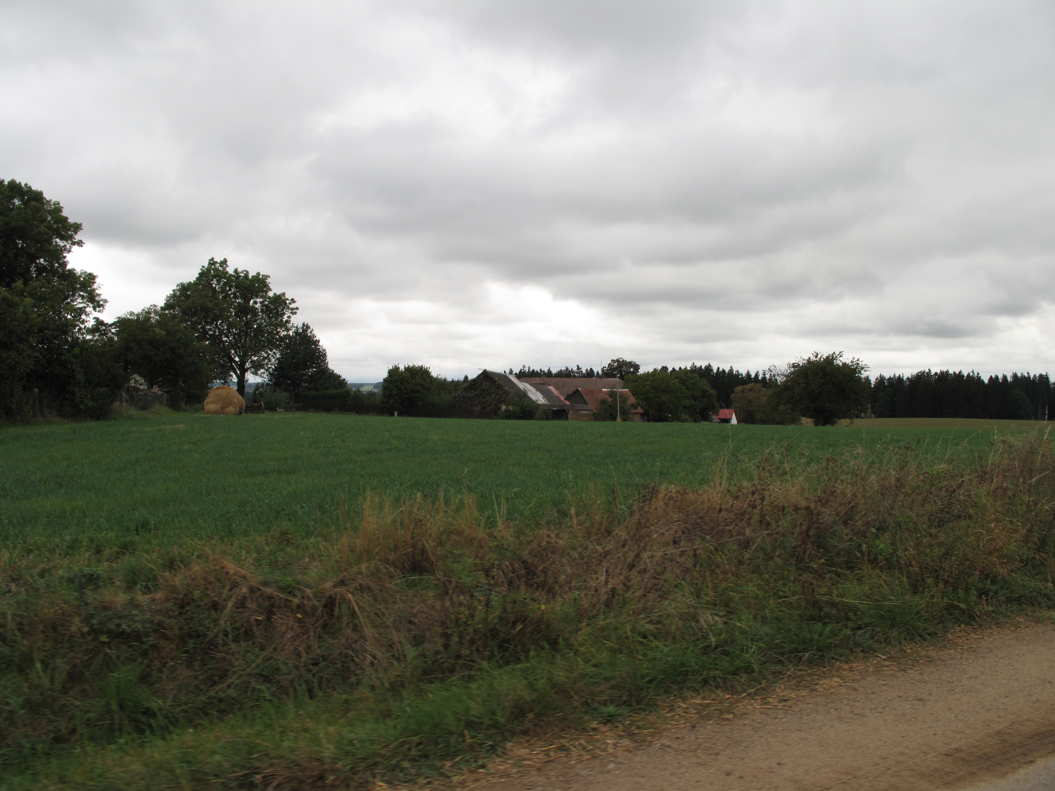 Louka a domy ve Skočidolovicích. Okres Pelhřimov, Česká republika.